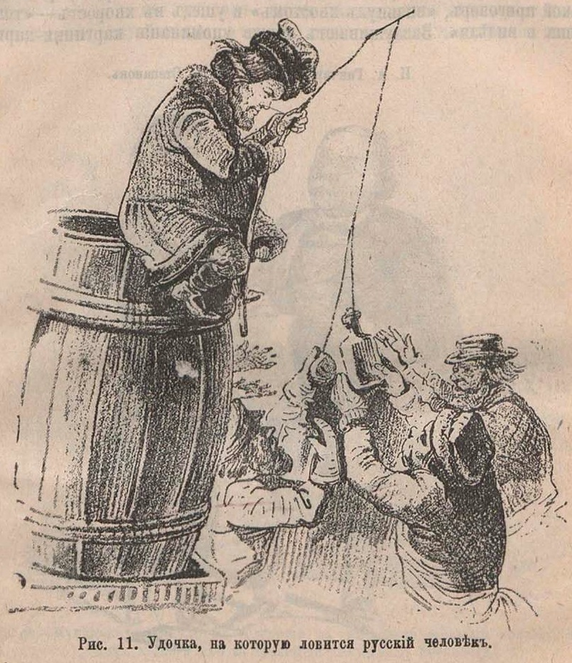 « L'hameçon auquel mord le Russe. » Caricature russe dont l'original remonte au milieu du XIXe siècle. En effet, selon Svetlana Geisser-Schnittmann de l'Université de Lausanne, ce dessin provient de l'album « Connaissances » (Знакомые) de Nikolaï Stepanov publié dans les années 1850 (Svetlana Geisser-Schnittmann, Венедикт Ерофеев. «Москва – Петушки», или «The rest is silence», Berne : Peter Lang, 1989, pp. 160-161).